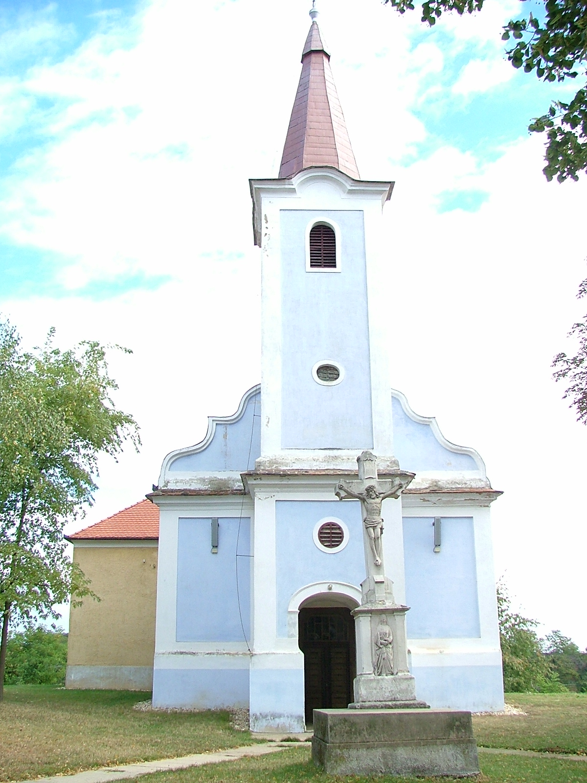 Allerheiligen-Kirche in Csehimindszent